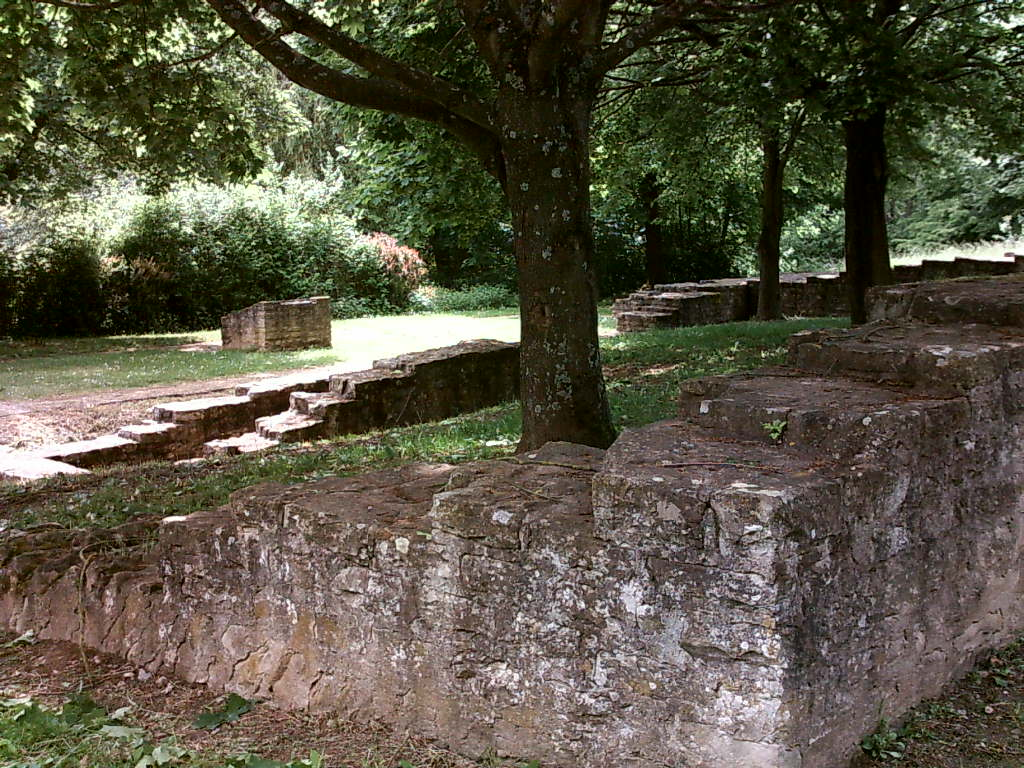 Villa rustica bei Bad Rappenau-Zimmerhof, von Osten gesehen